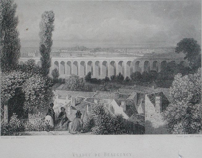 Gravure représentant le viaduc ferroviaire de Beaugency (Loiret, Centre, France) au XIXè siècle.